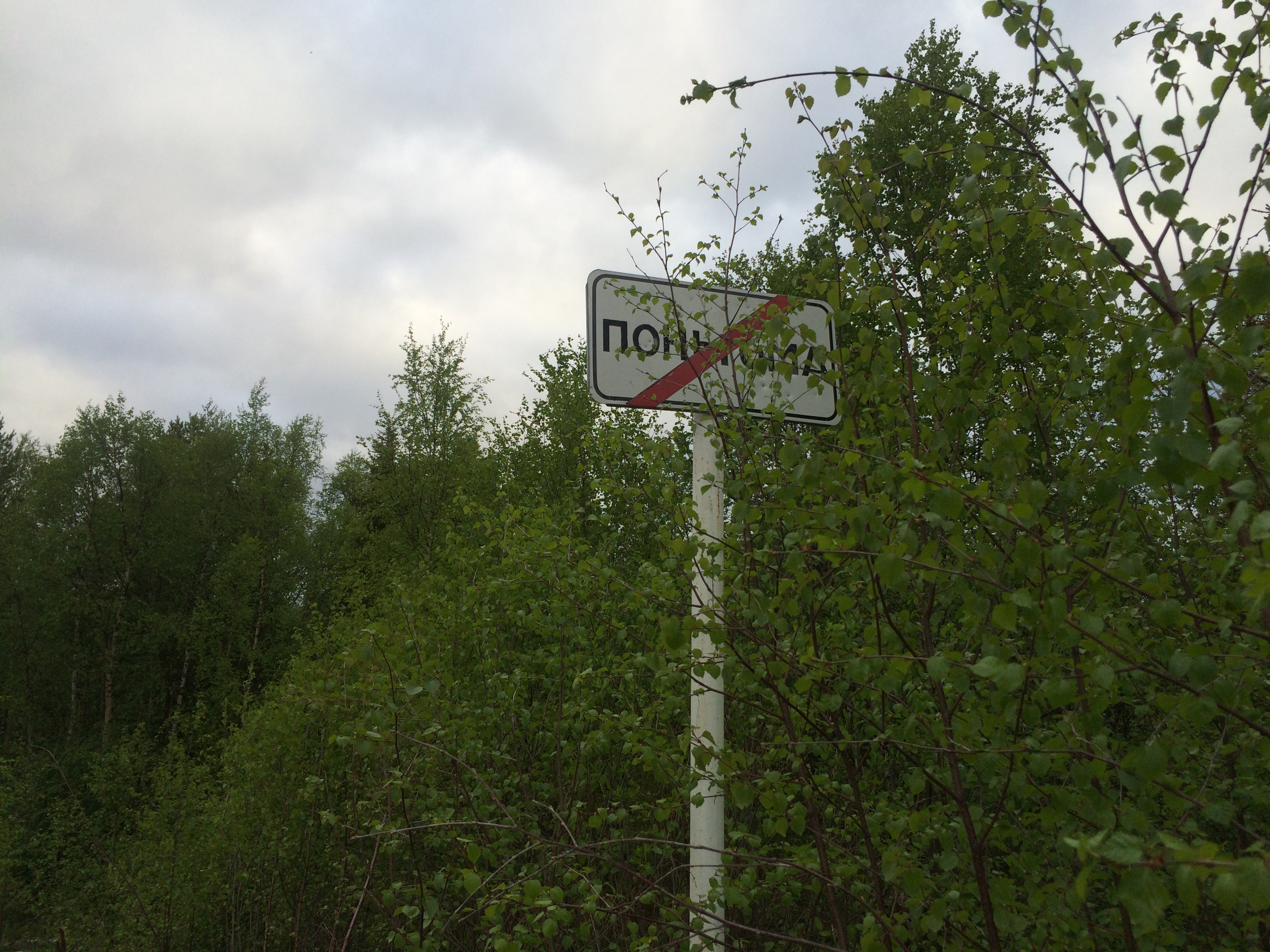 Дер. Поньгома